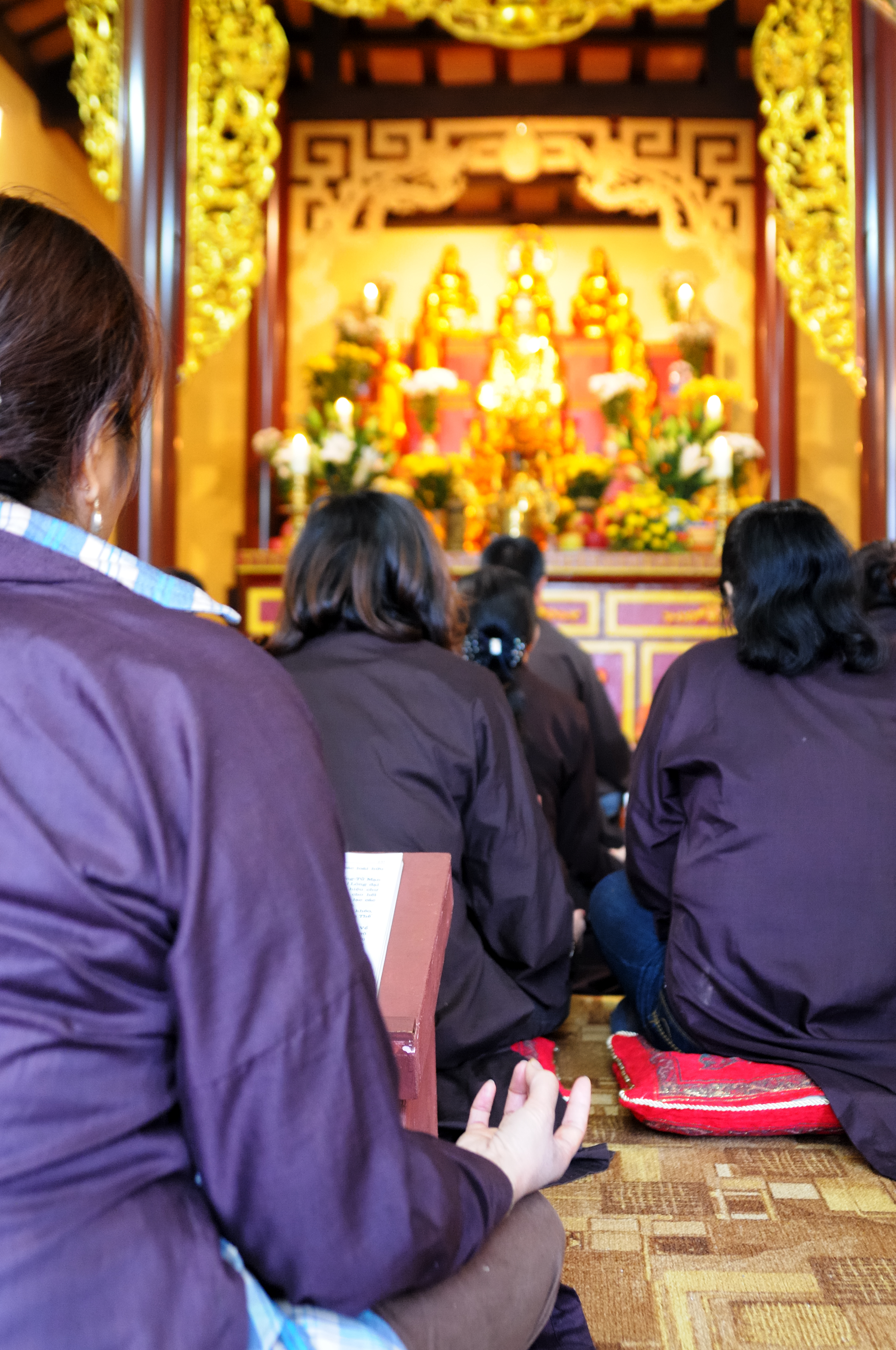 Warszawskie Spacery Fotograficzne Spacer 083 (Praga)